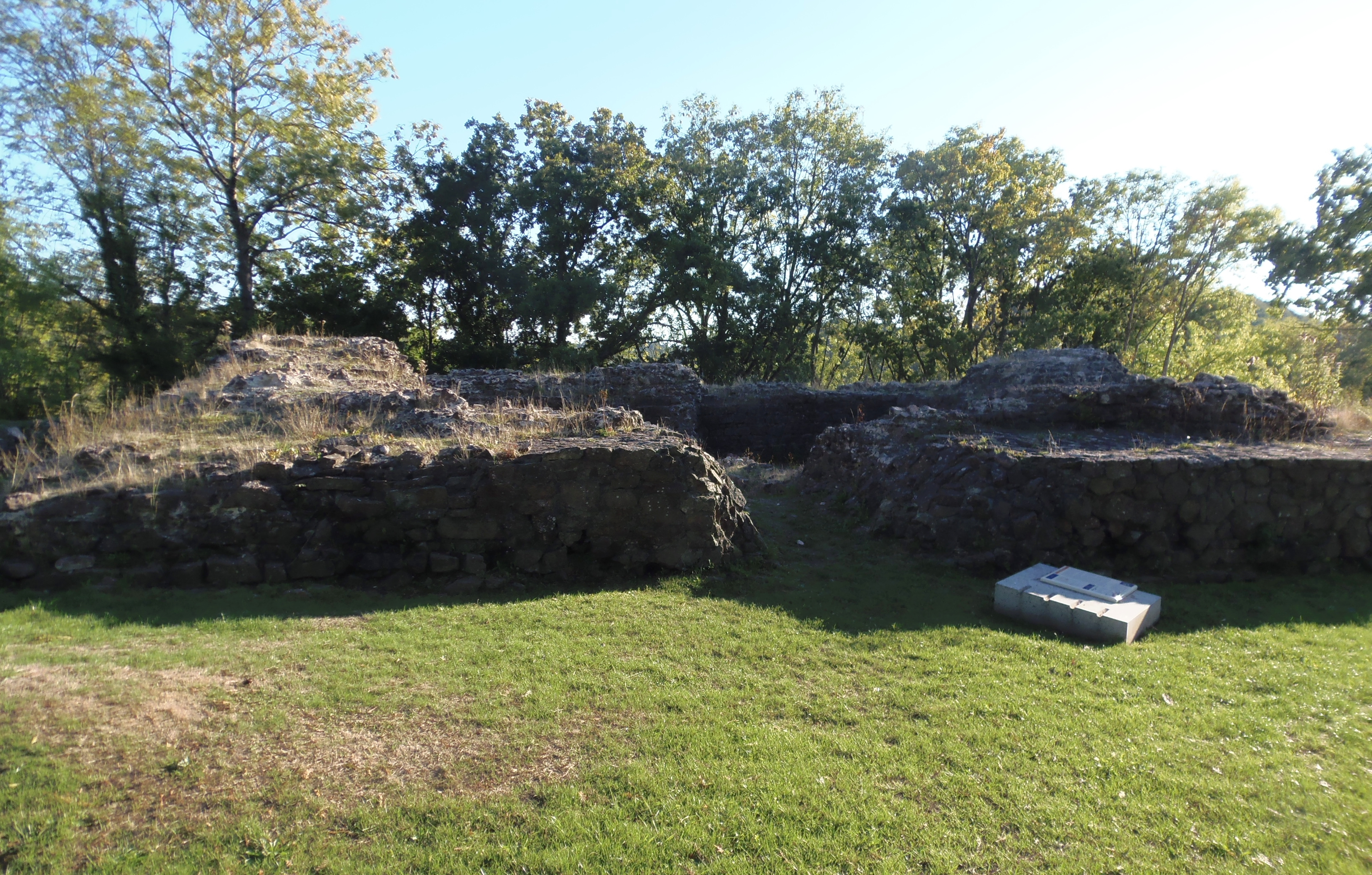 Gavray (Normandie, France). La ruine du donjon du château ducal.